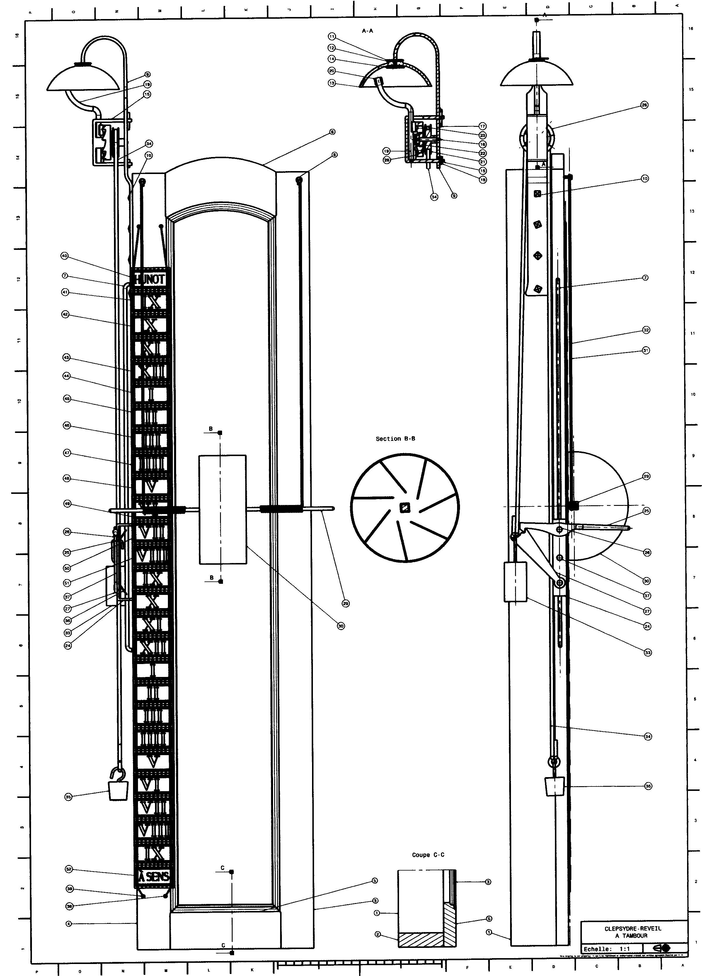 Dessin technique de la clepsydre de l'étude. Réalisation D. Heurton au lycée technique de Sens